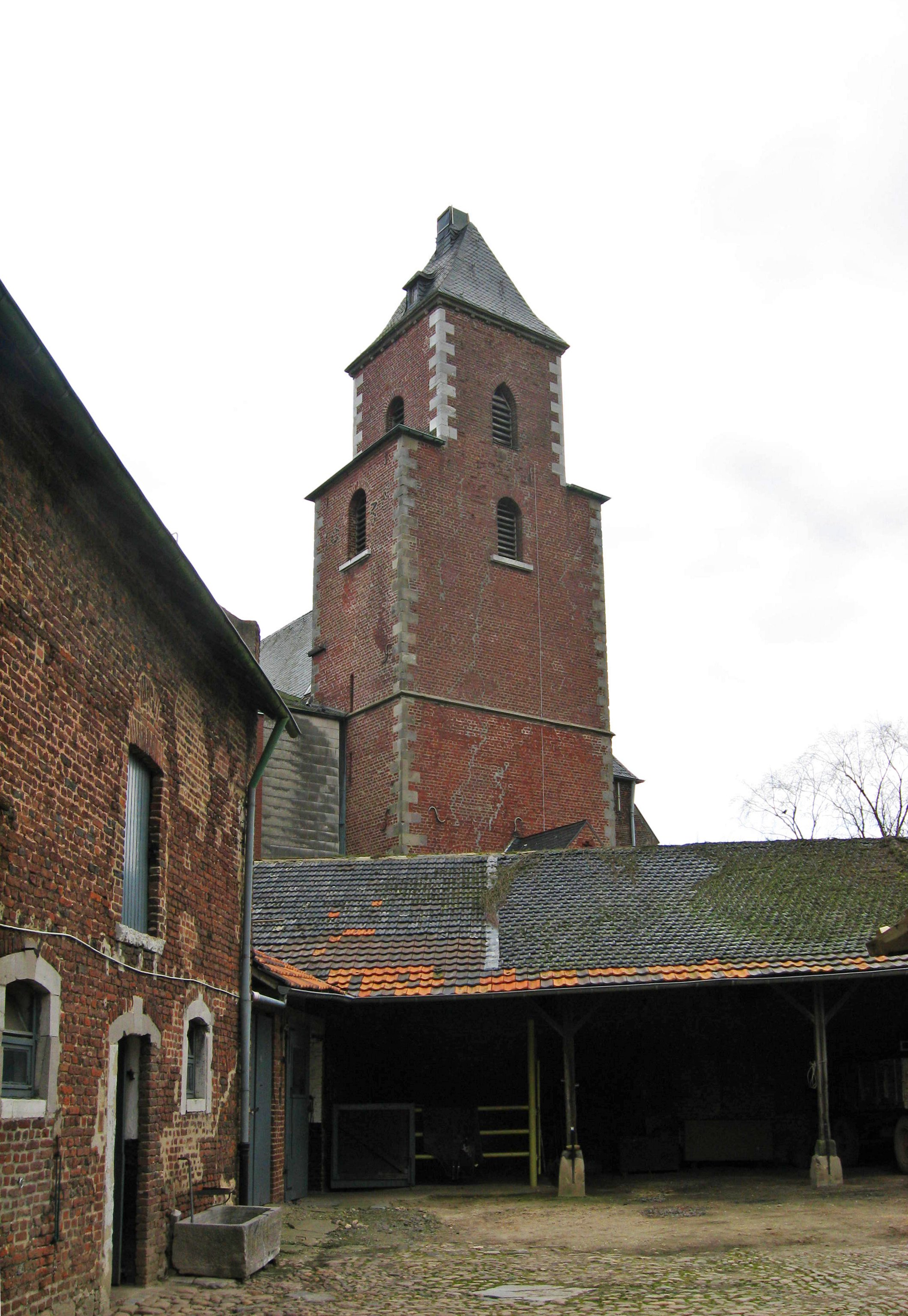 Kirche in Siersdorf